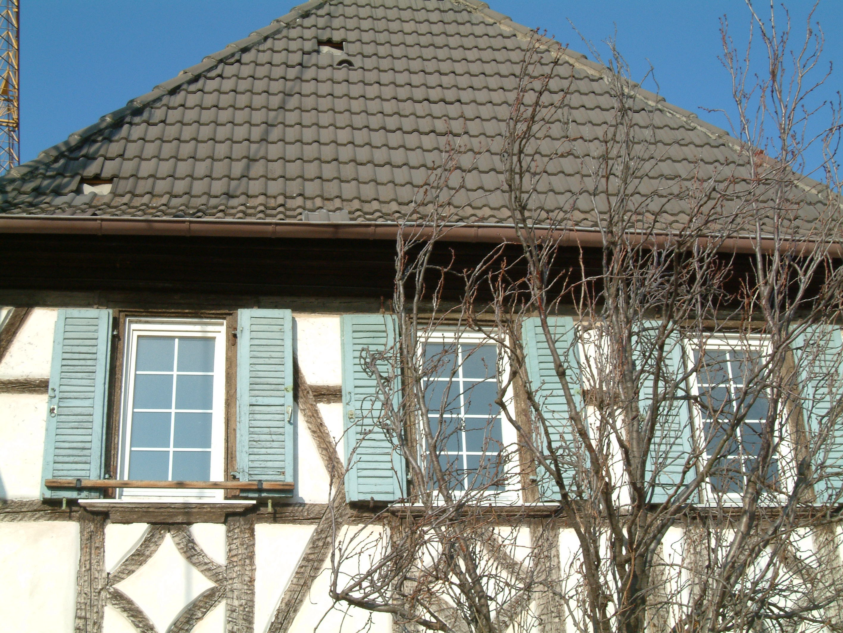 Franz Roth Domels Haus, Metzgergasse 7, Dirmstein